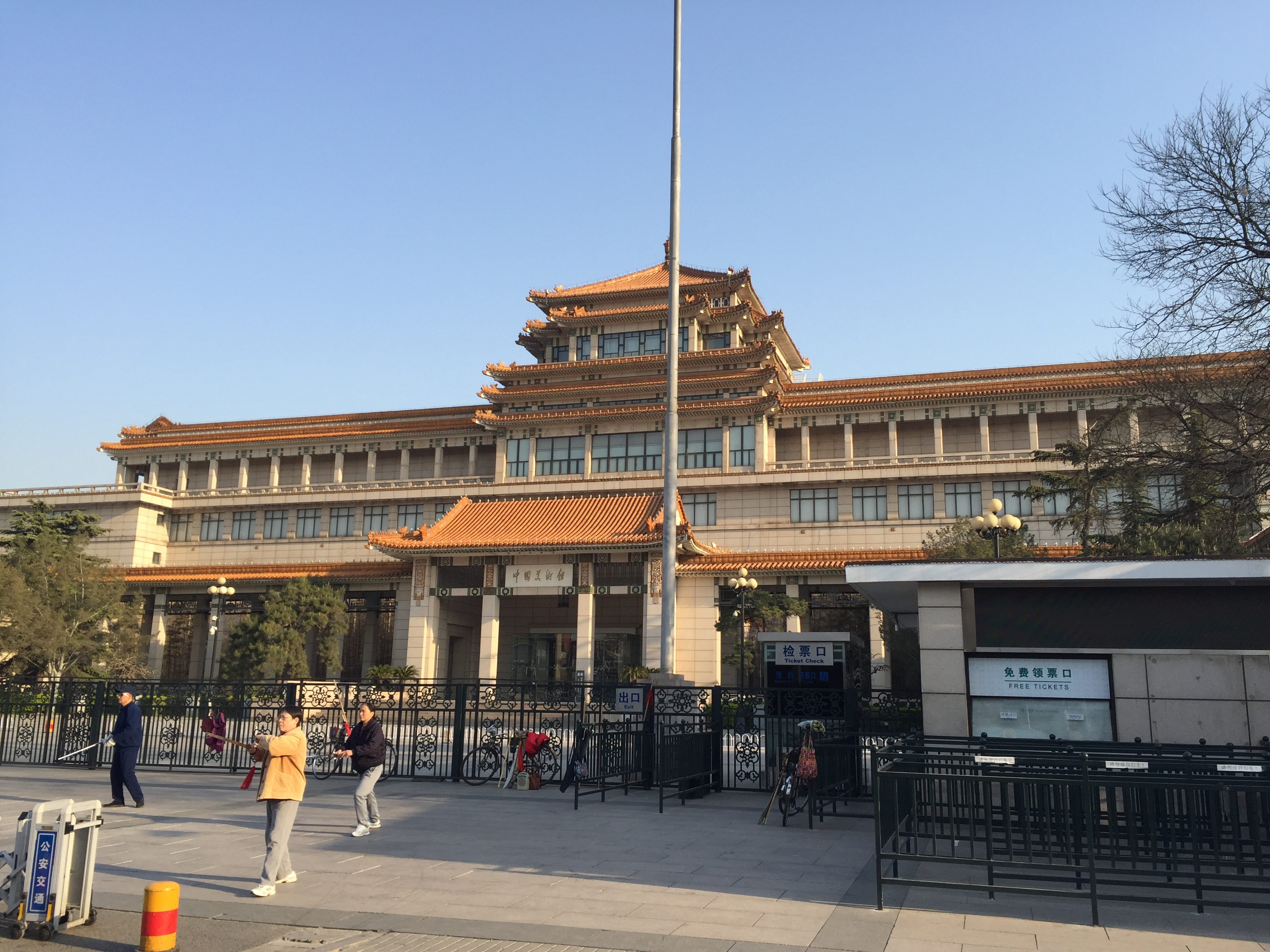 中国美术馆外观